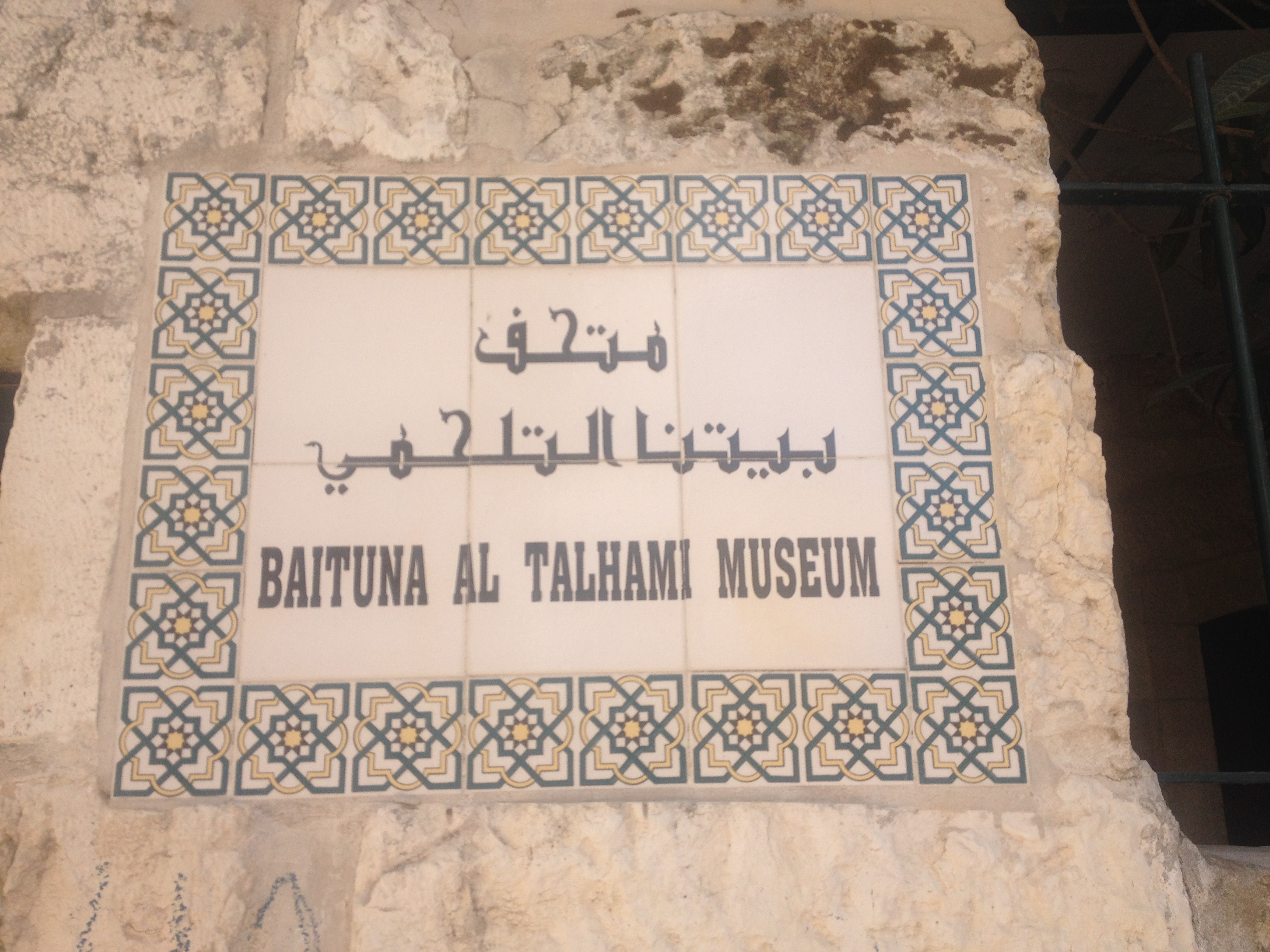 Baituna al-Talhami Museum, Bethlehem name sign